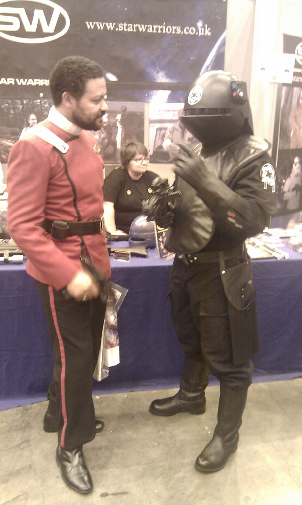 Star Trek meets Star Wars